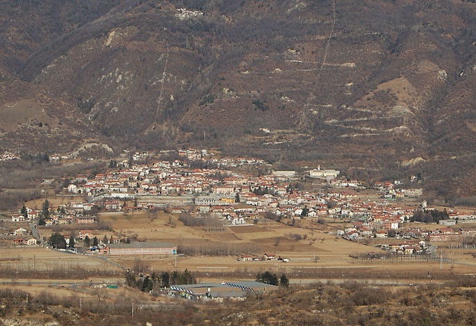 Bruzolo